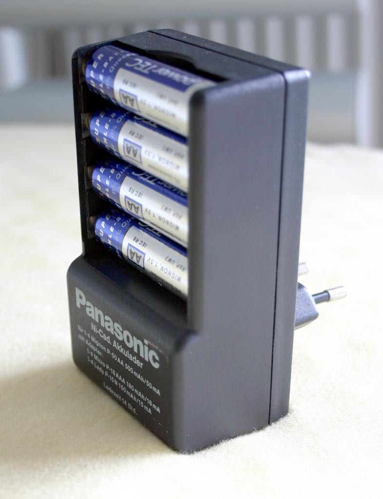 Ladegerät für Batterien